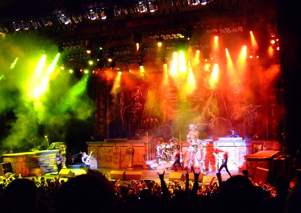 Iron Maiden in concerto il 01-06-2008